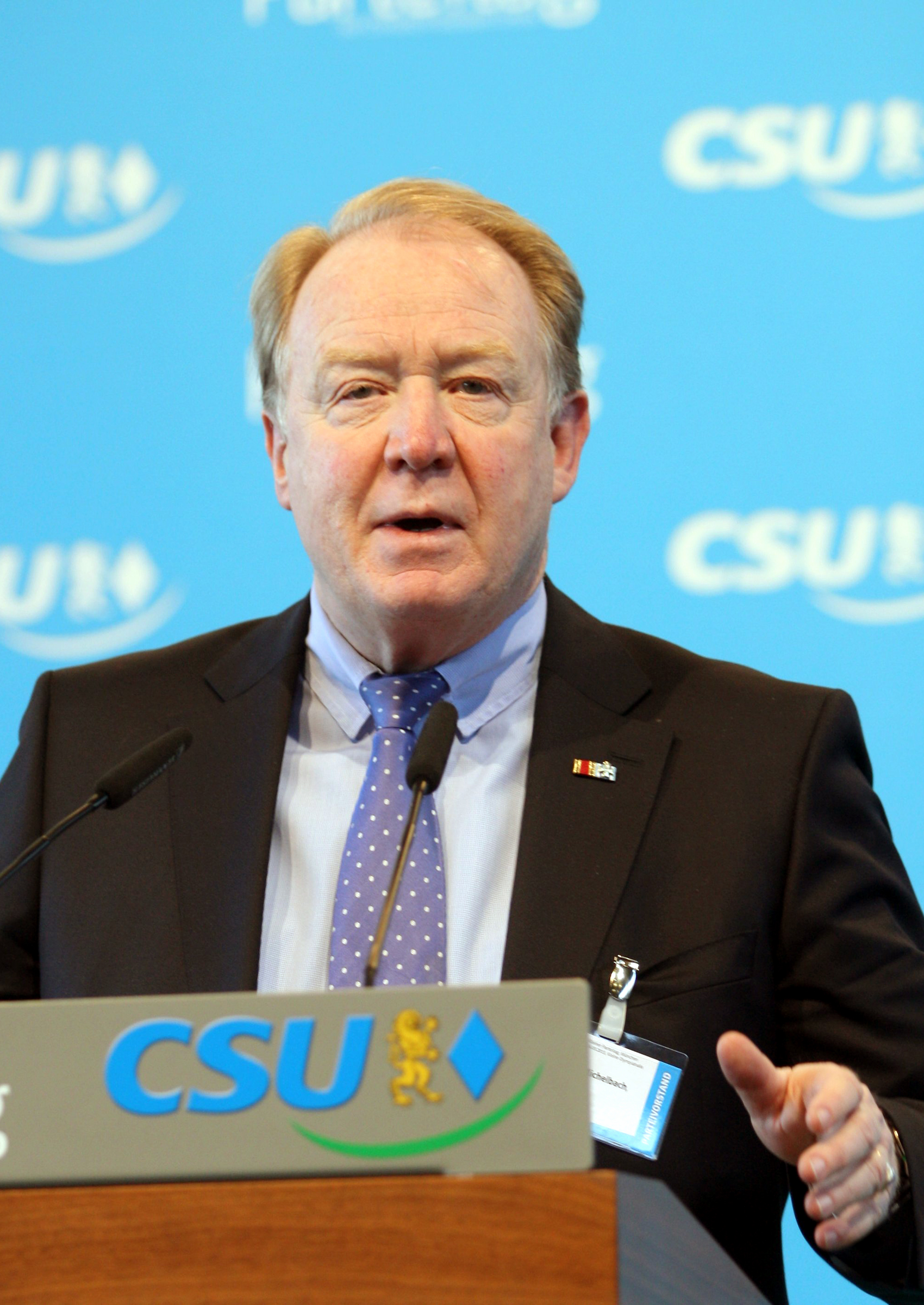 Hans Michelbach, deutscher Politiker (CSU). Seit 2009 ist er Obmann der CDU/CSU-Bundestagsfraktion des Ausschusses für Finanzen im Deutschen Bundestag. Hier auf dem kleinen Parteitag der CSU am 16.03.2013 in München.